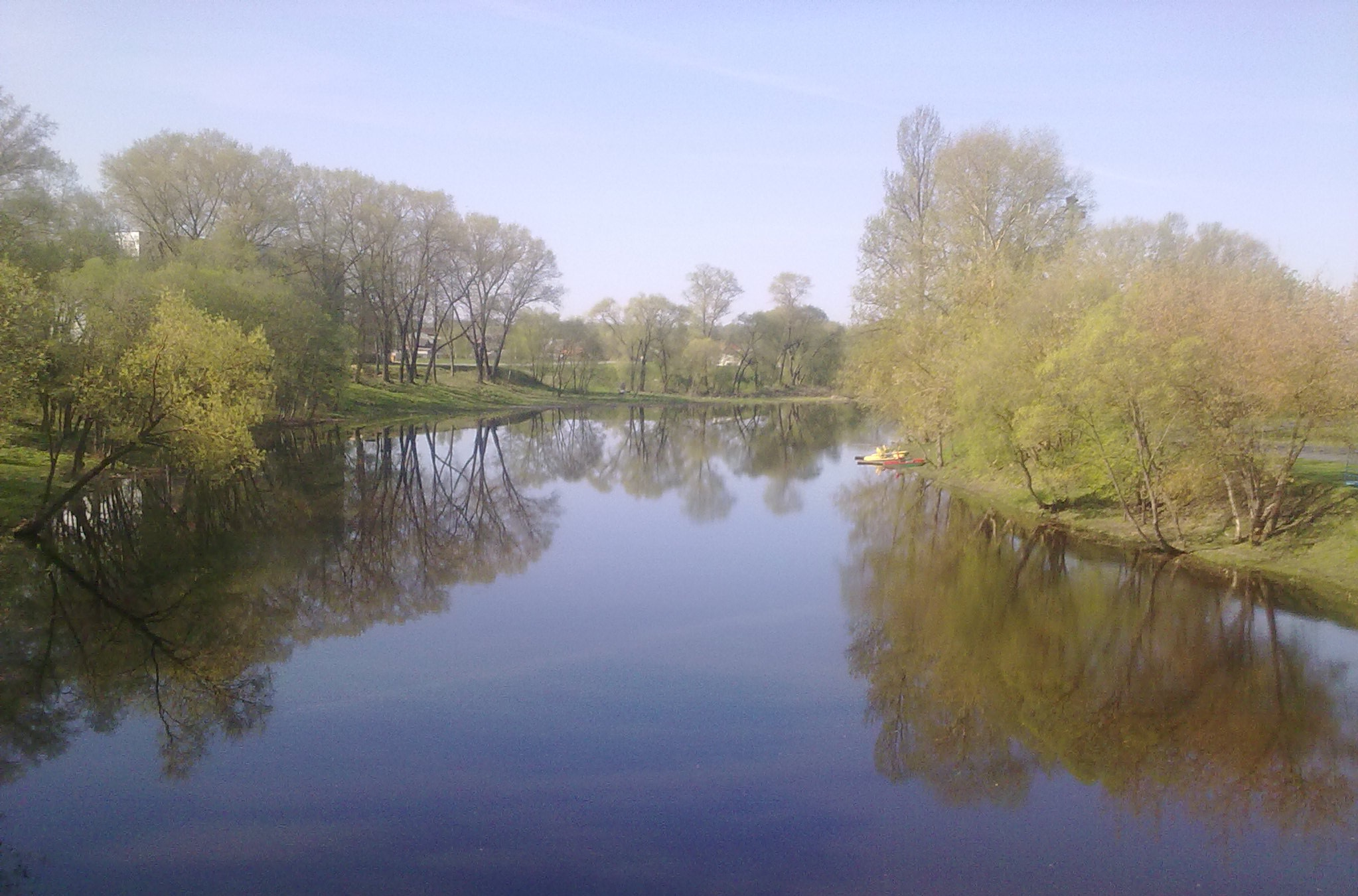 Река Адров в районе города Барань.